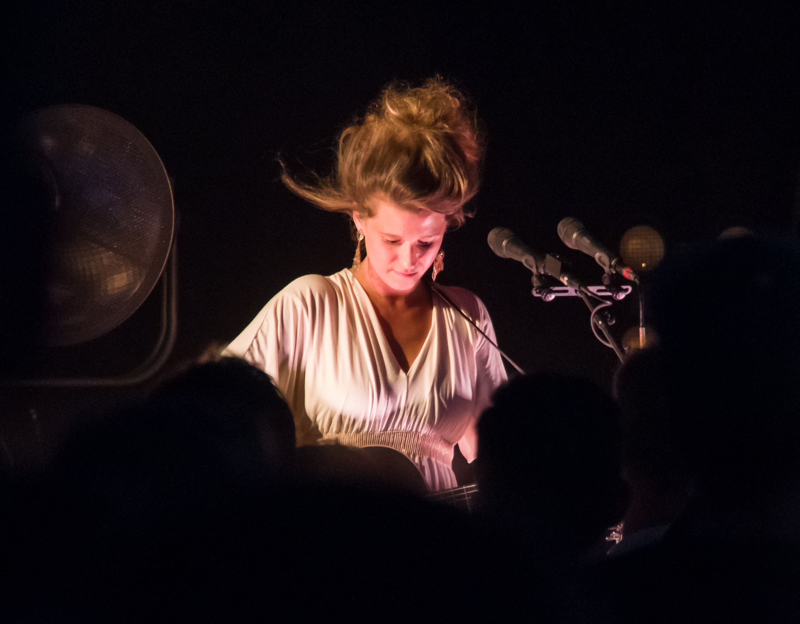 Das Zelt-Musik-Festival 2018 in Freiburg im Breisgau 26.07.2018 Selah Sue